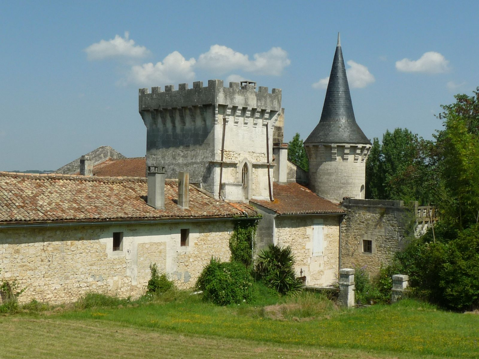 Logis de Pindray, l'Isle-d'Espagnac (16), France